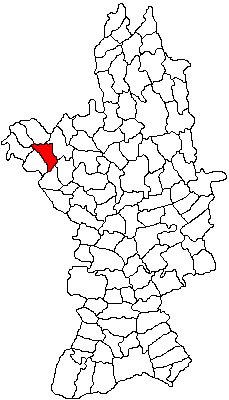 Categorie:Hărţi ale judeţului Olt